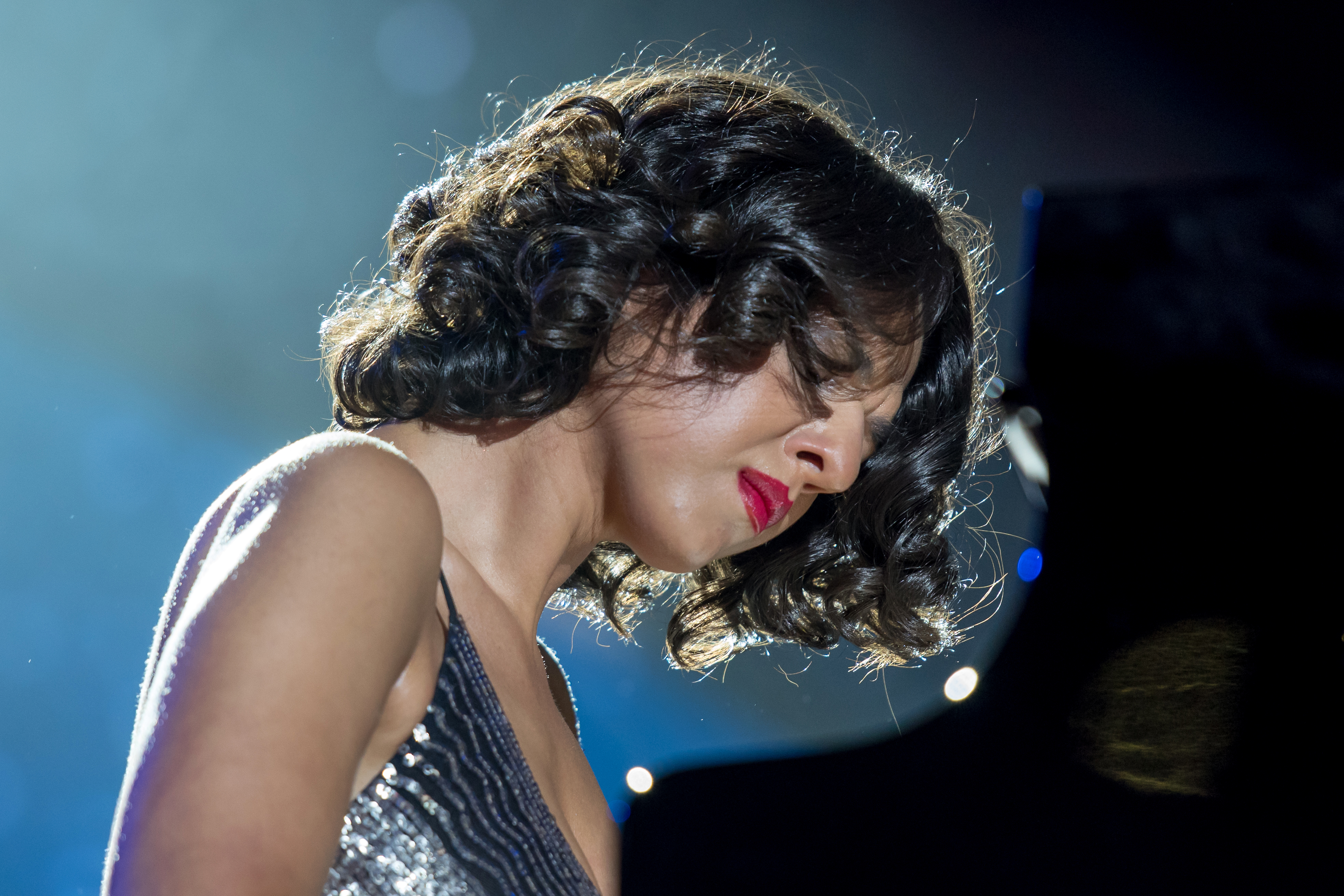 Khatia Buniatishvili beim Global Citizen Festival in Hamburg